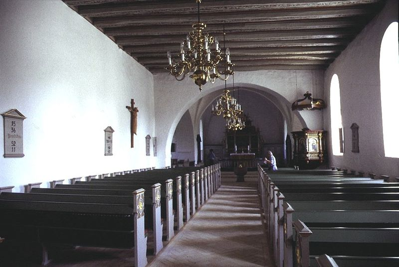 Borbjerg Kirke i Danmark. Skibet set mod øst